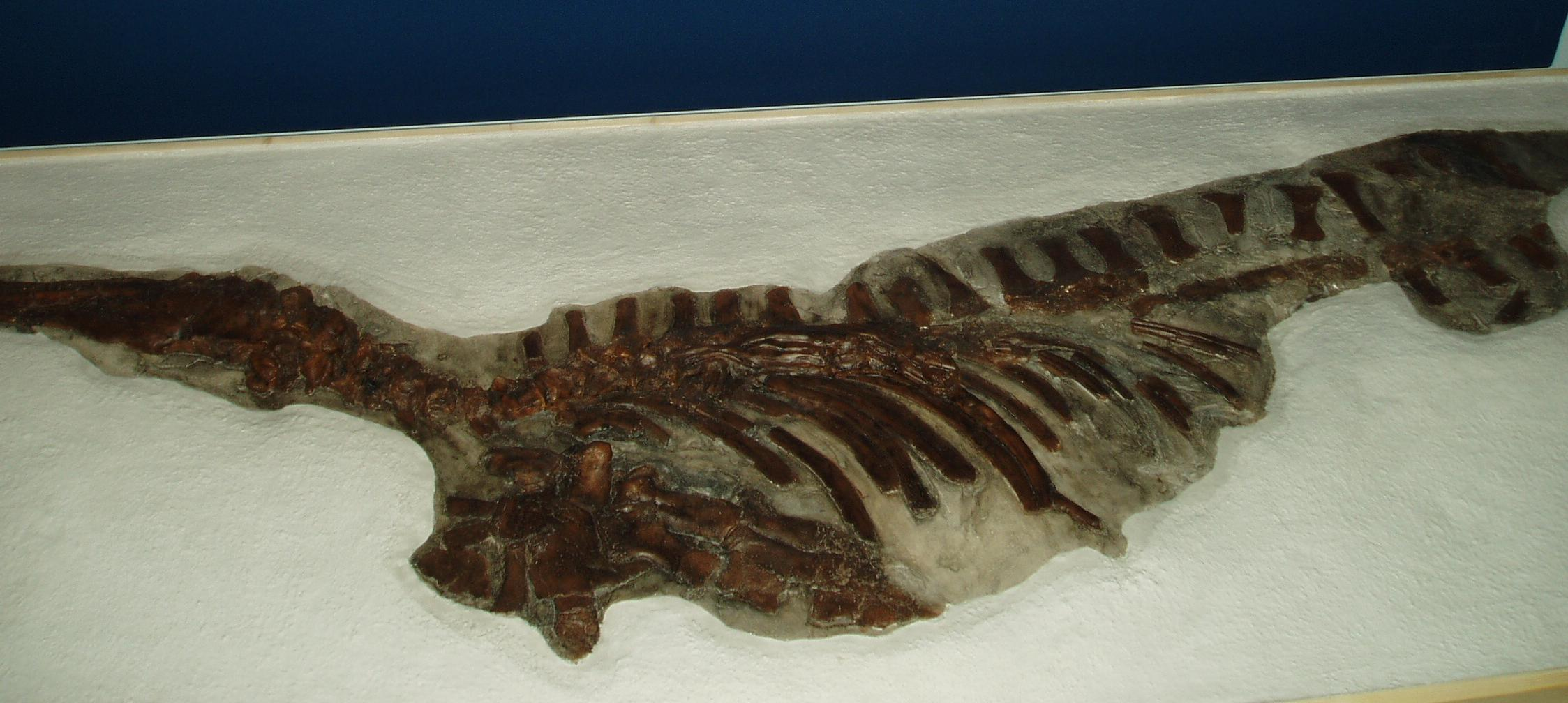 Foto Delphin aus der Ausstellung des NÖ Landesmuseum: "Meeresstrand am Alpenrand"